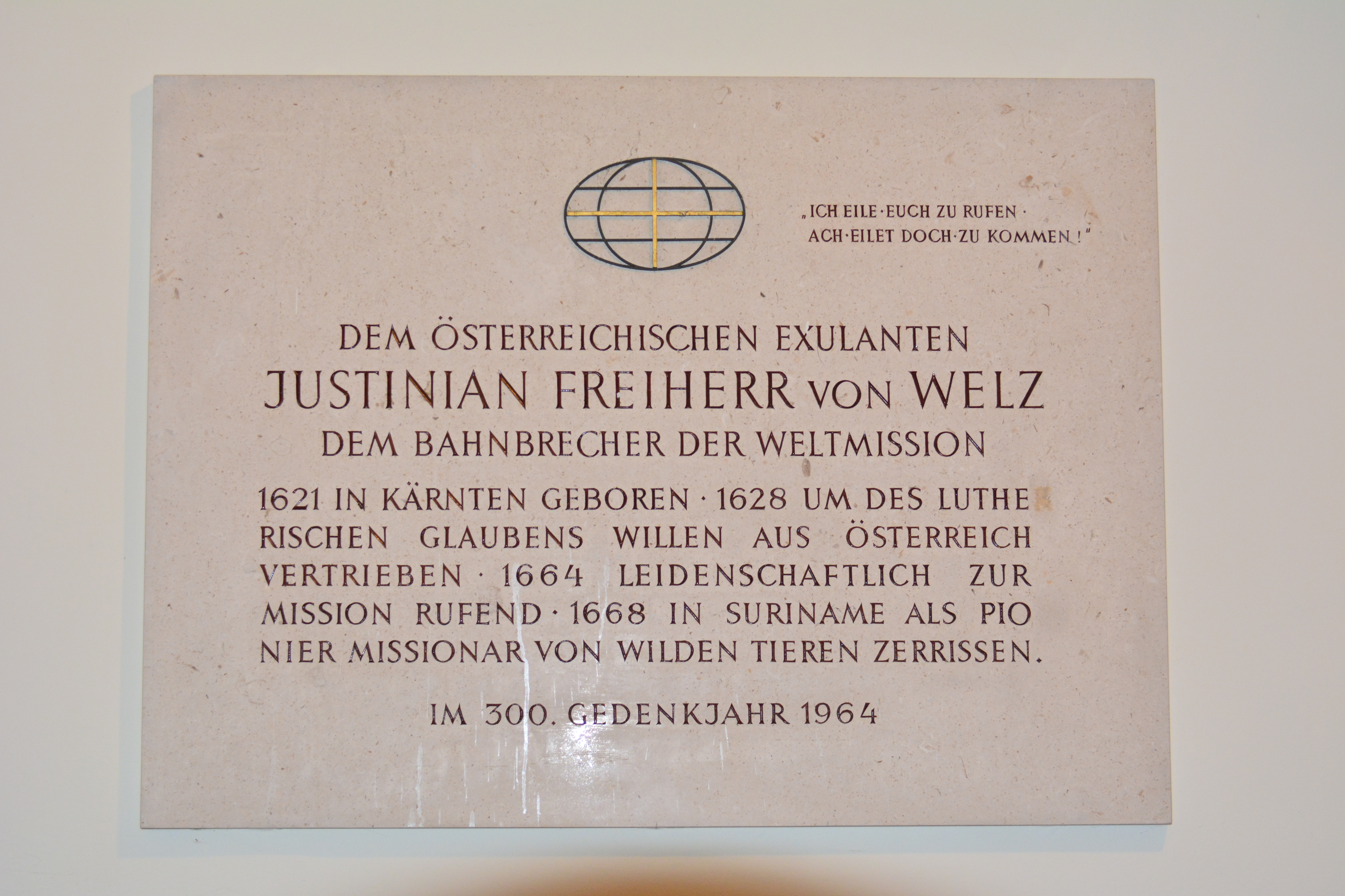 Gedenktafel für Justinian von Welz (Wien, Lutherplatz 2)